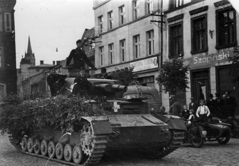 Polen, Panzer IV in einer Stadt Zum Vormarsch unserer Ostarmee Die Einheiten der deutschen Panzerwaffe haben in dem schnellen Zusammenschluss der von Ostpreussen und Pommern durch den Korridor vordringenden Truppen grossen Anteil. Scherl Bilderdienst-Hinz 6.9.39 [Polen.- Mit Zweigen getarnter Panzer IV bei Fahrt in einer Stadt]